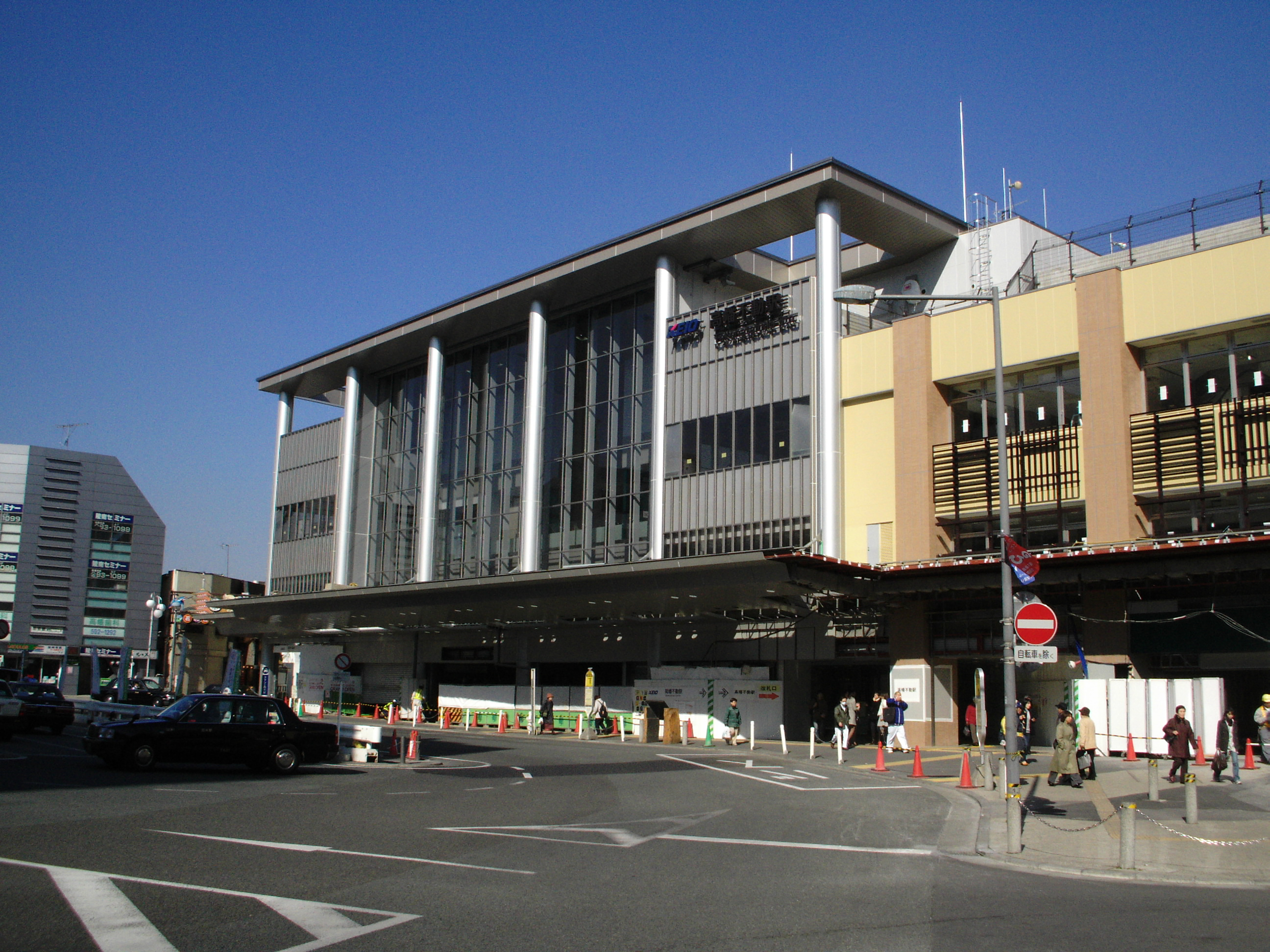 Takahatafudo Station